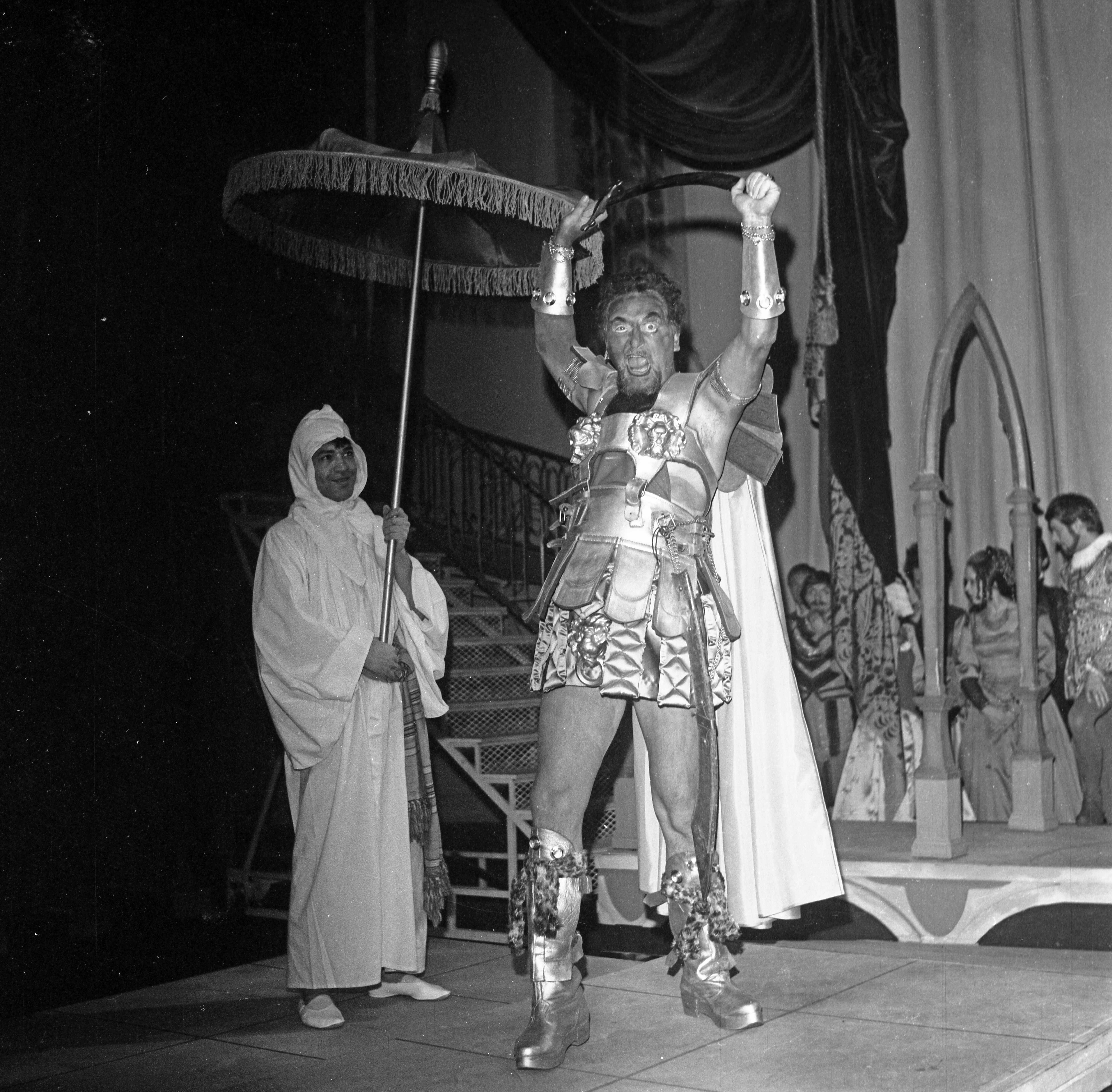 Norske skådespelaren Rolf Berntzen som Fursten av Marocko i Köpmannen i Venedig vid Den Nationale Scene i Bergen 1969.